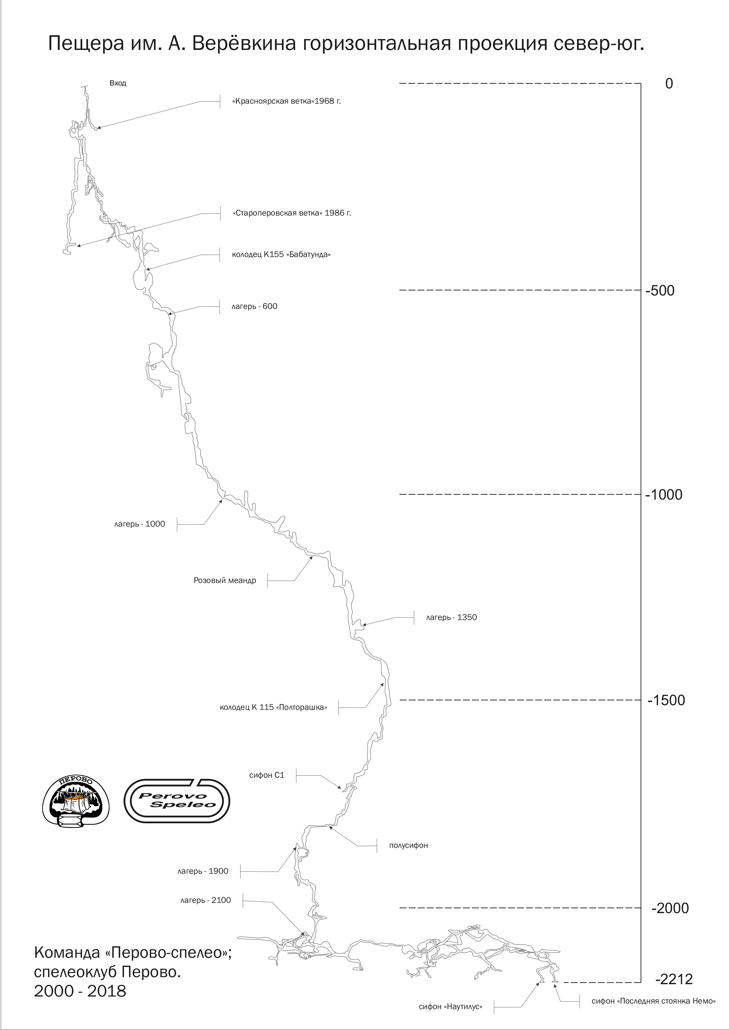 На основании данных топосъёмки Команды Перово-спелео и Спелеоклуба Перово на август 2018 года.